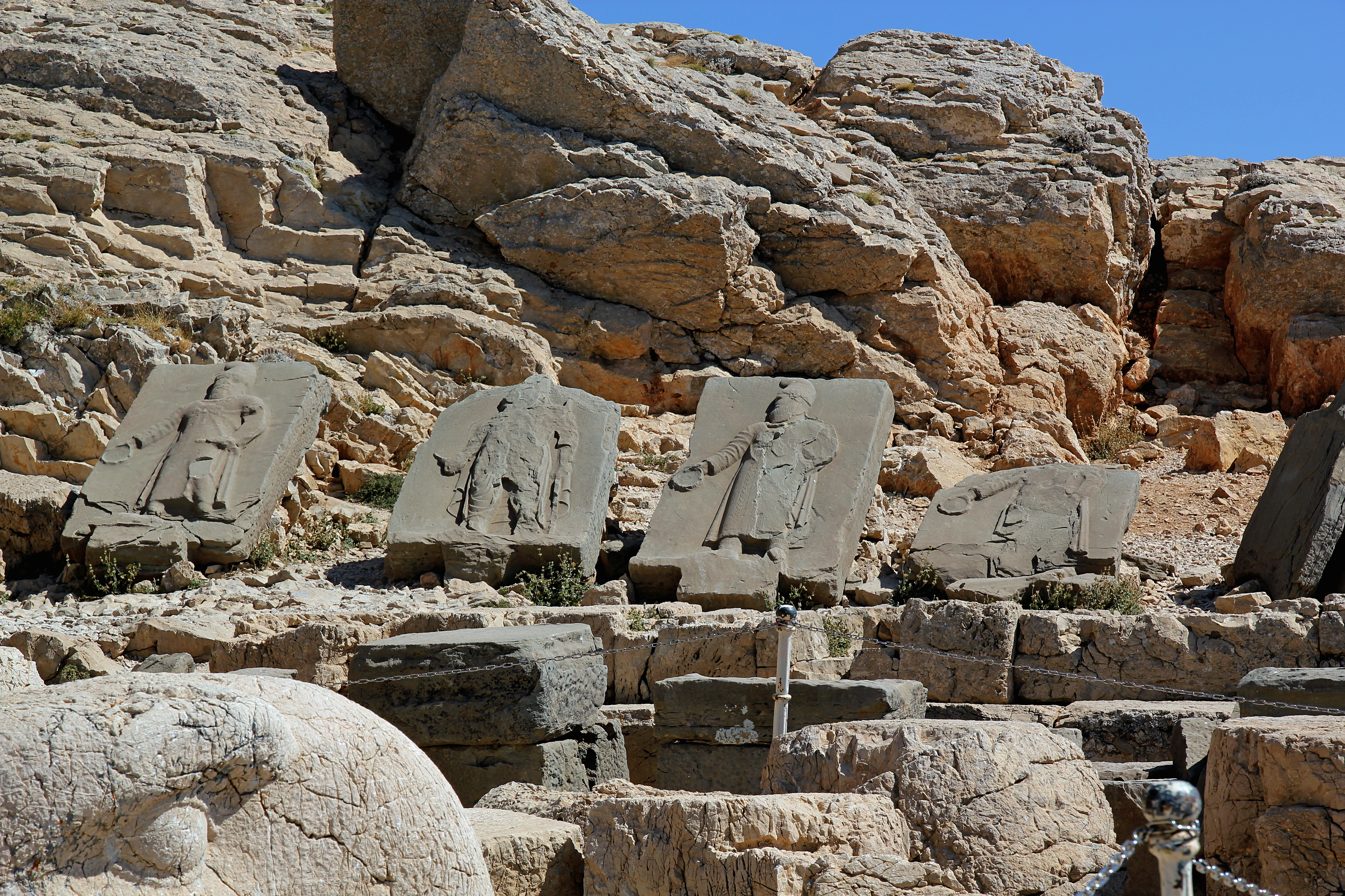 Reihe der Sockel der persischen Ahnen, von links Darius I., -danes, Xerxes I., Unbekannter Vorfahr. Nemrut Dağı, Südosttürkei, Westterrasse